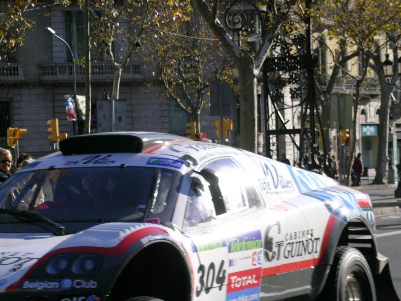 Volkswagen Tarek used in the Dakar Rally